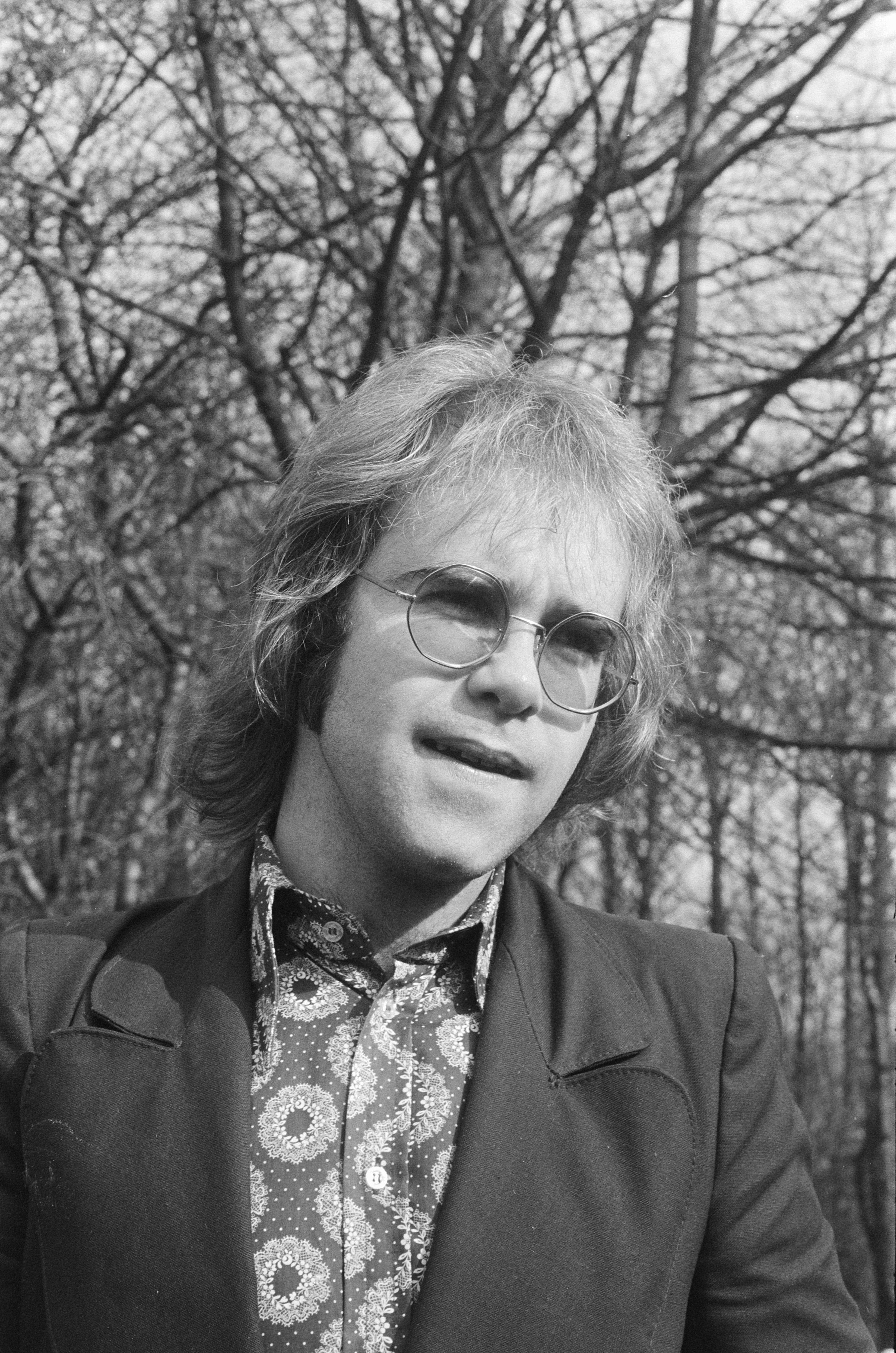 Collectie / Archief : Fotocollectie Anefo Reportage / Serie : [ onbekend ] Beschrijving : Popzanger Elton John in Nederland Datum : 17 februari 1971 Trefwoorden : musici, muziek, popzangers, portretten, zangers Persoonsnaam : Elton John Fotograaf : Verhoeff, Bert / Anefo Auteursrechthebbende : Nationaal Archief Materiaalsoort : Negatief (zwart/wit) Nummer archiefinventaris : bekijk toegang 2.24.01.05 Bestanddeelnummer : 924-2769